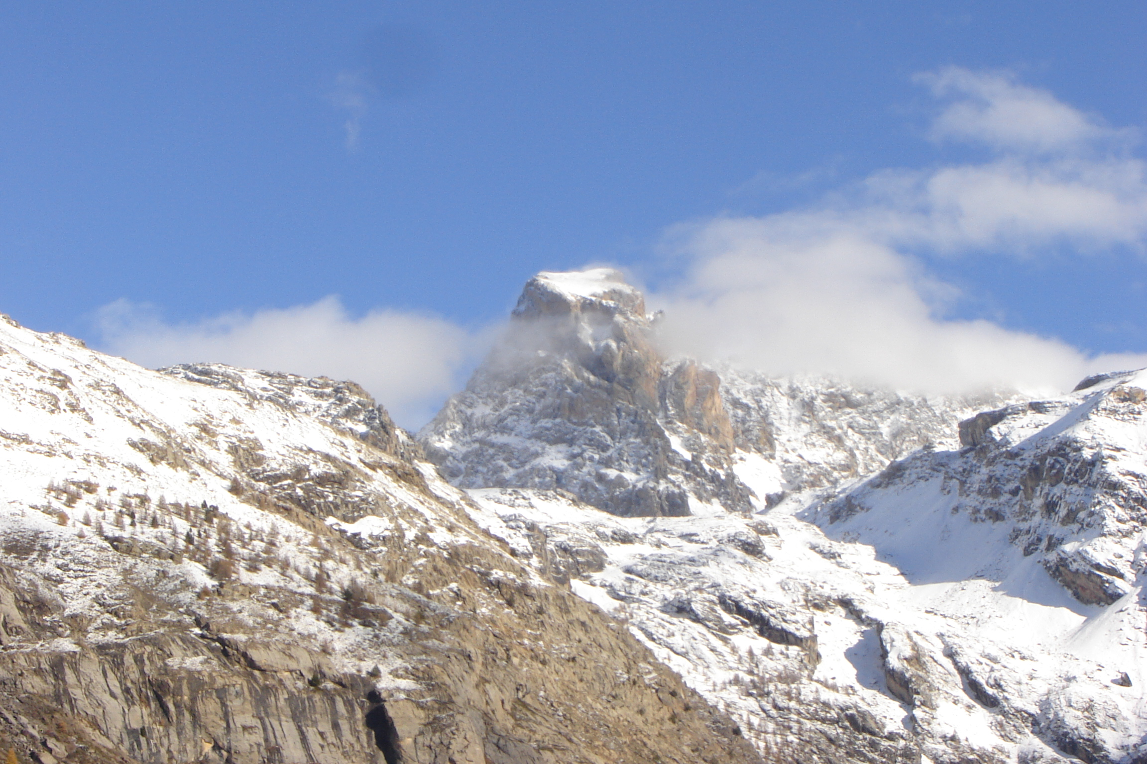 Brec du Chambeyron vu de Fouillouse (04)